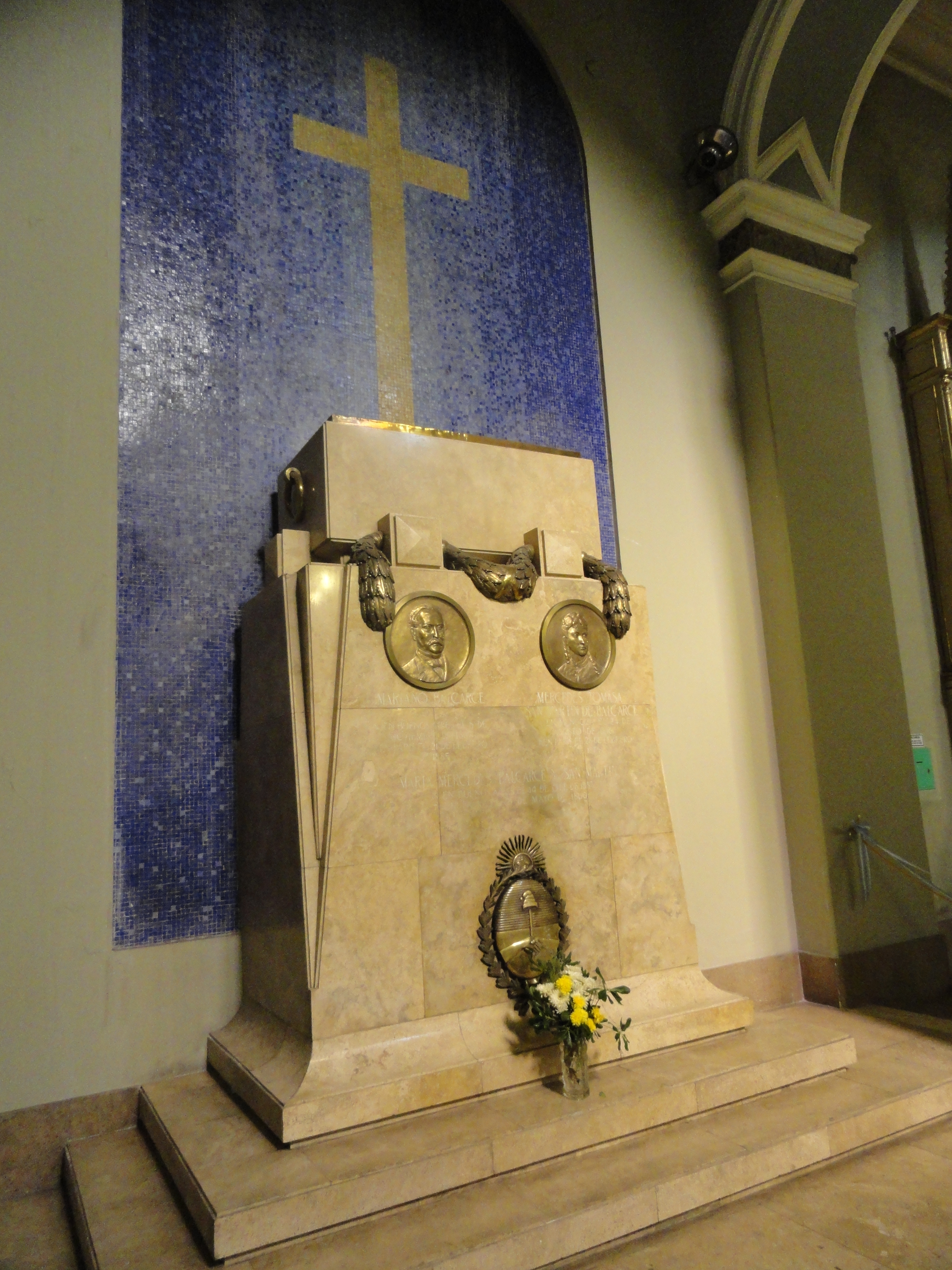 Mausoleo donde descansan los restos de Mercedes Tomasa San Martín y Escalada, su esposo Mariano Severo Balcarce y su hija María Mercedes Balcarce